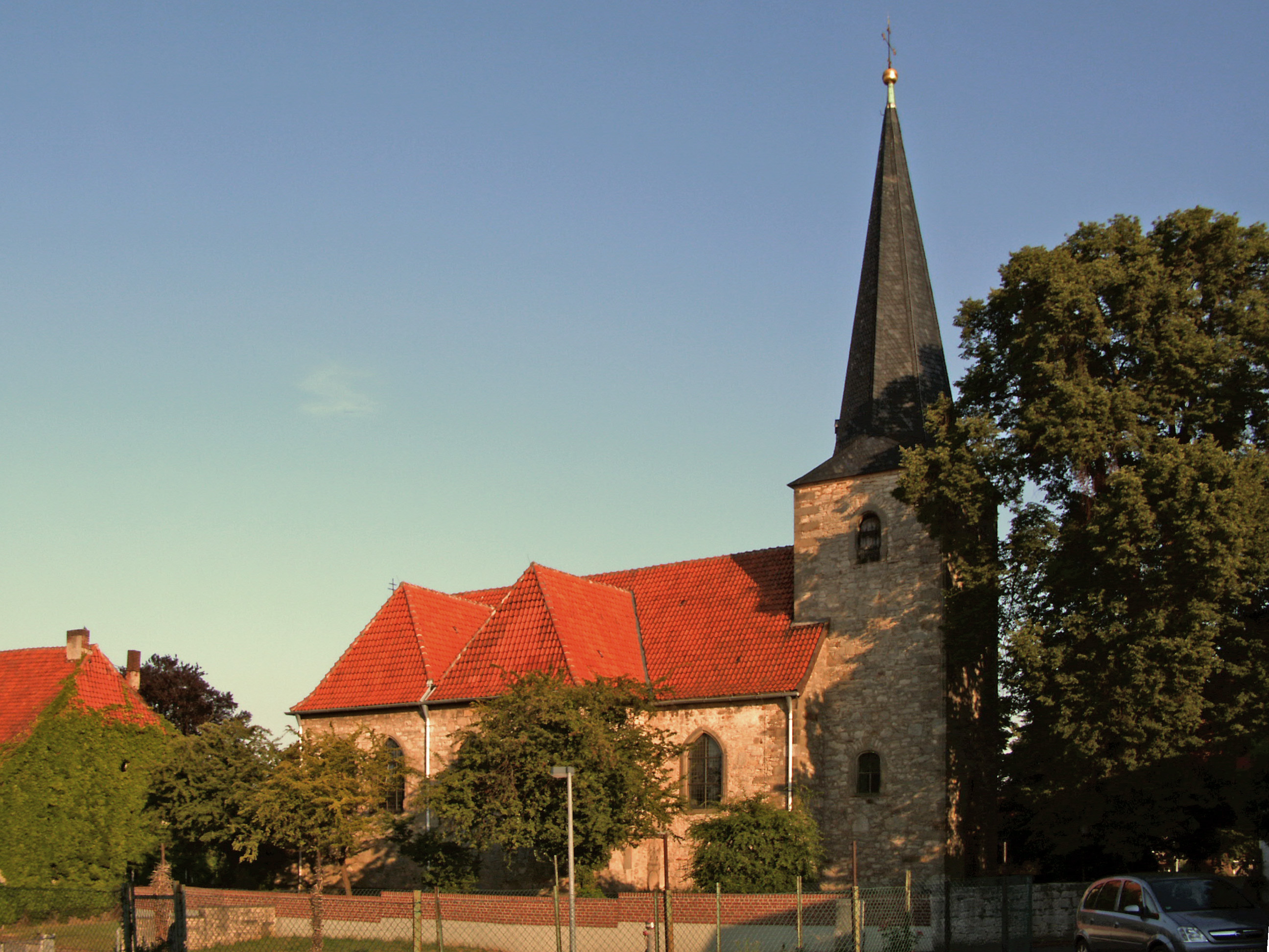 Katholische Kirche in Groß Giesen, Landkreis Hildesheim; rechts im Bild am Kirchturm die als Naturdenkmal geschützte Linde (ND-HI 165)